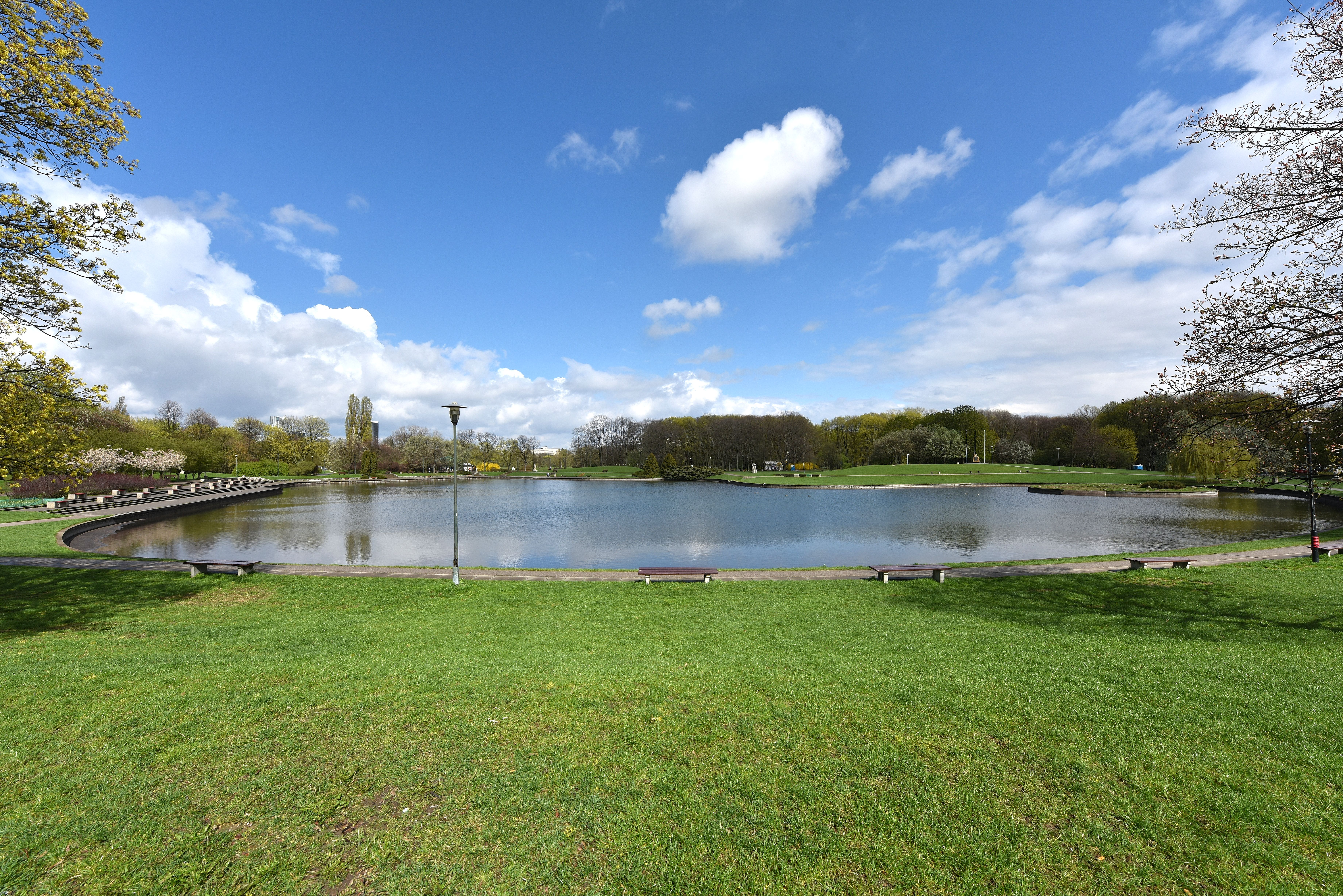 Staw na Polu Mokotowskim w Warszawie